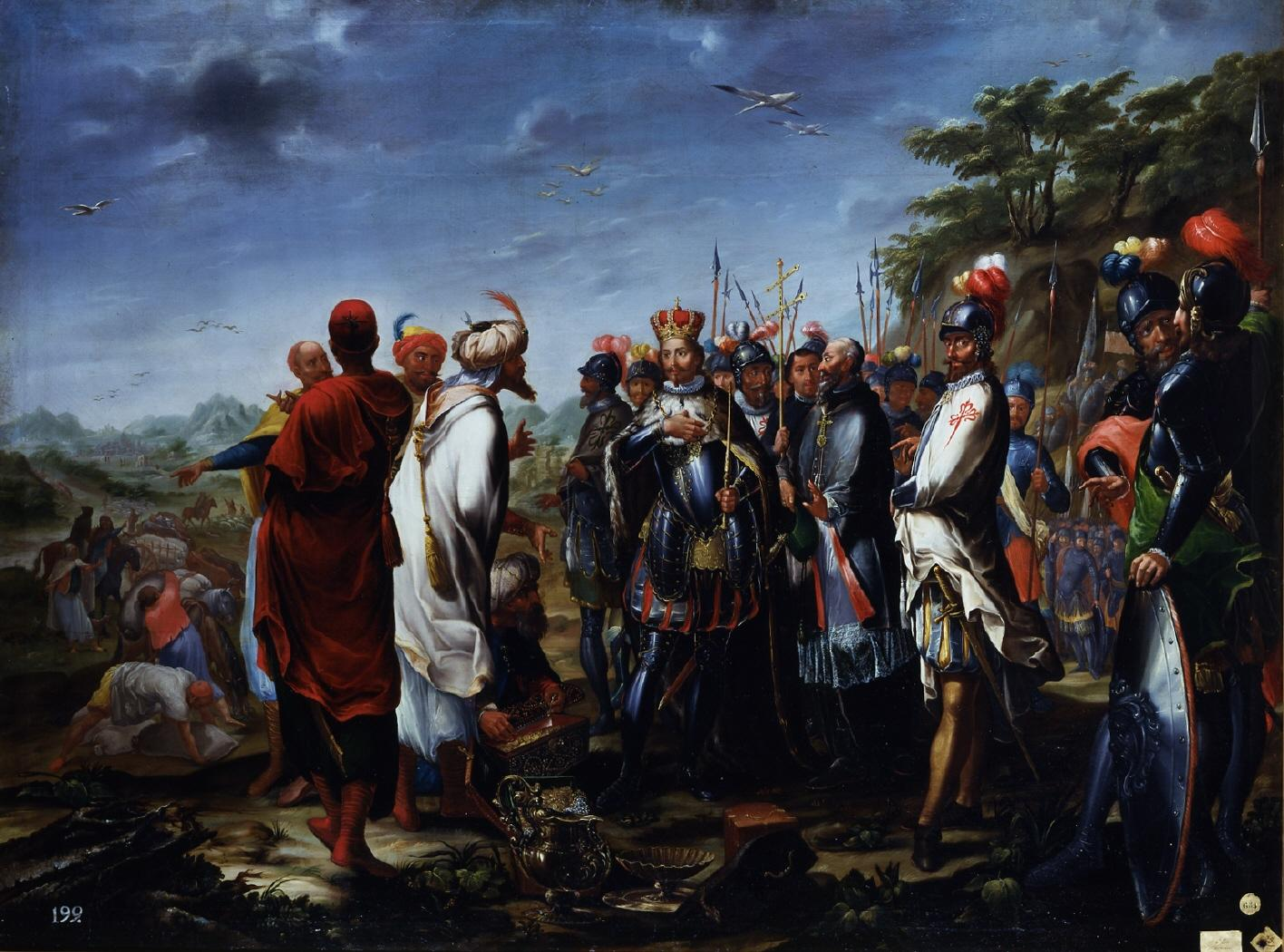 La obra podría representar la conquista de Orán por las tropas españolas o bien al rey San Fernando recibiendo una embajada del rey musulmán de Baeza.